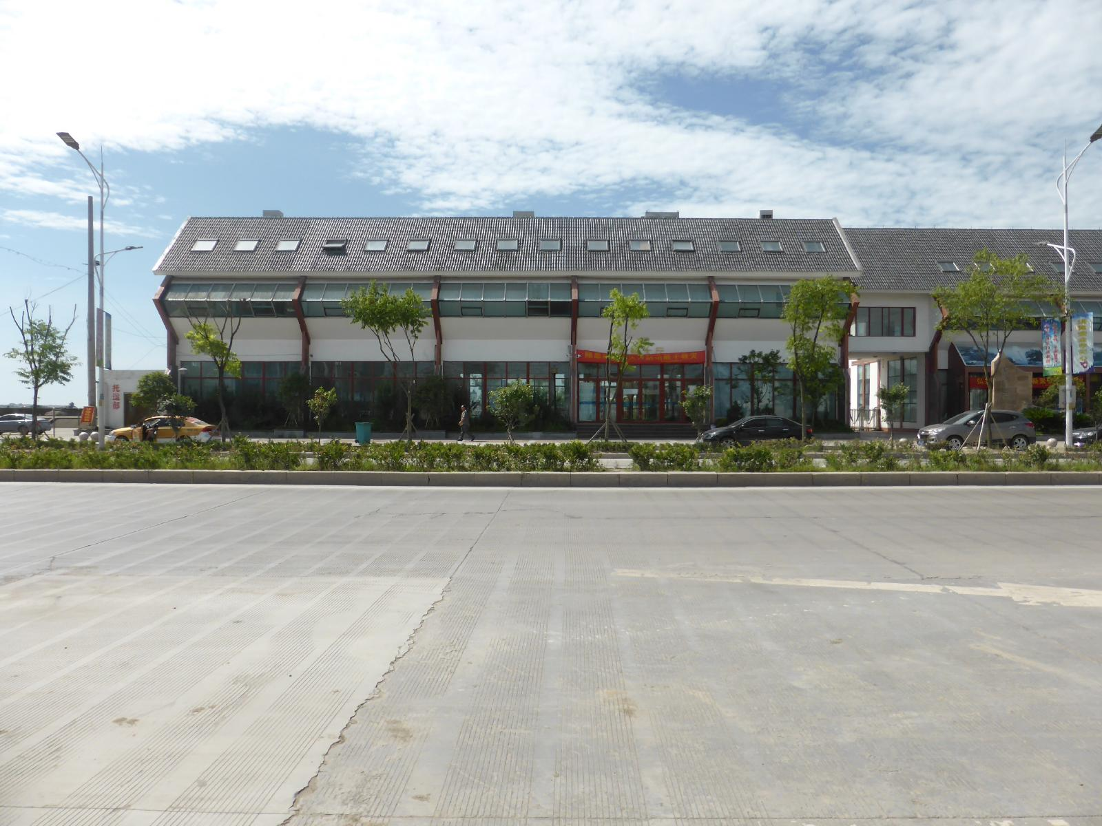 温州市平陽県にある南ジ島行きのターミナル